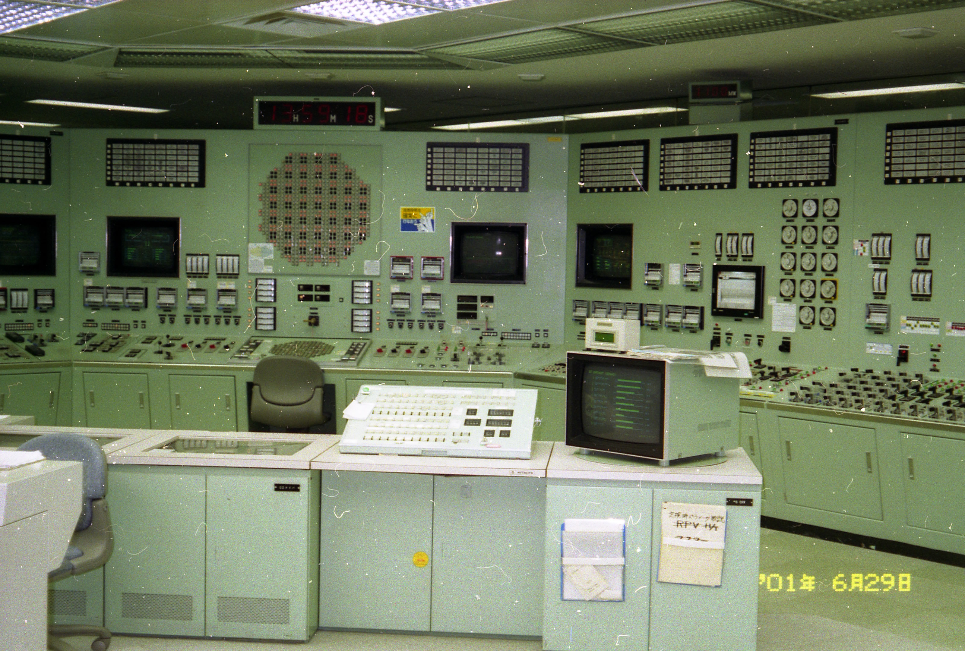 この発電所は、幸いにも 東日本大震災に耐えた。